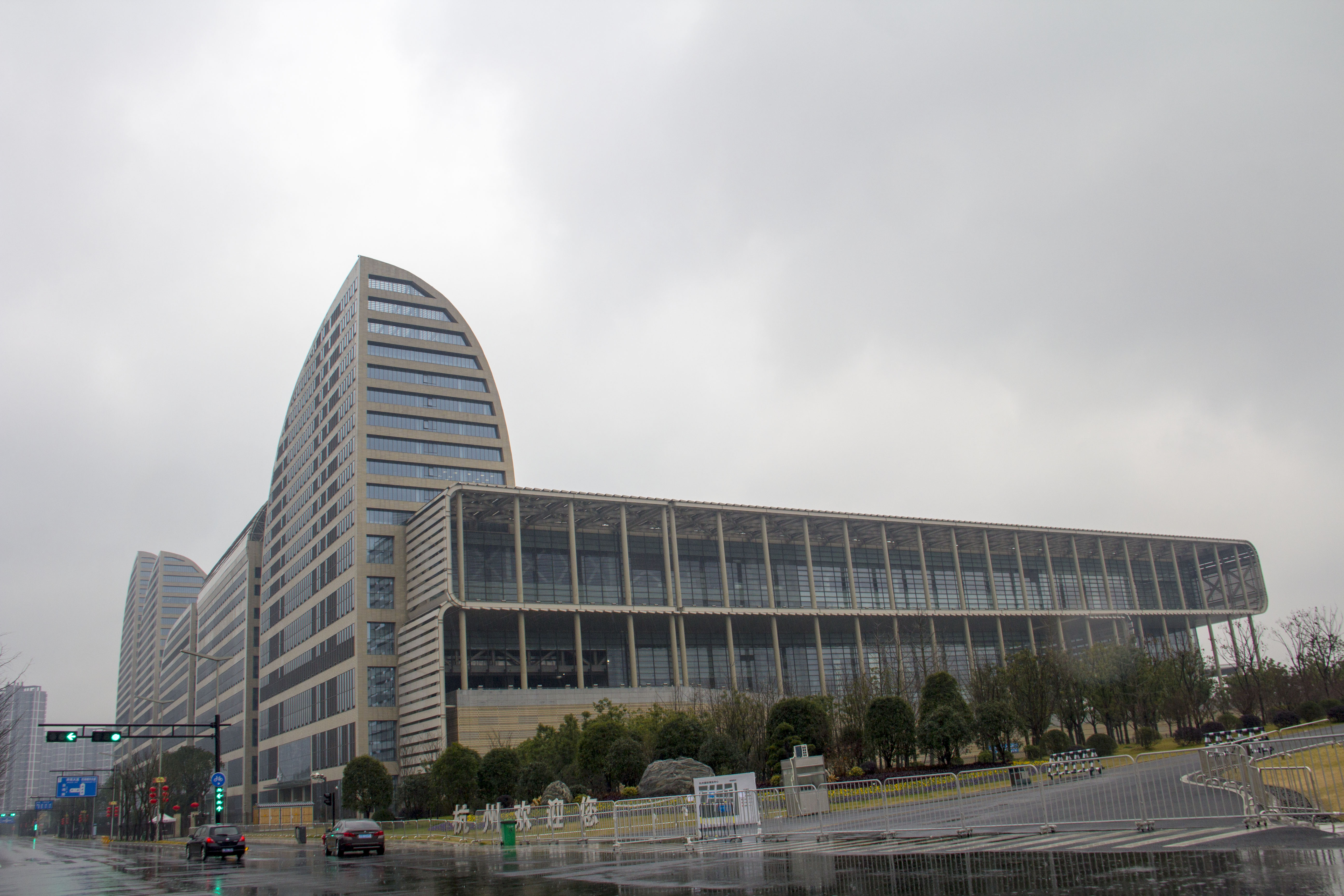 杭州国际博览中心